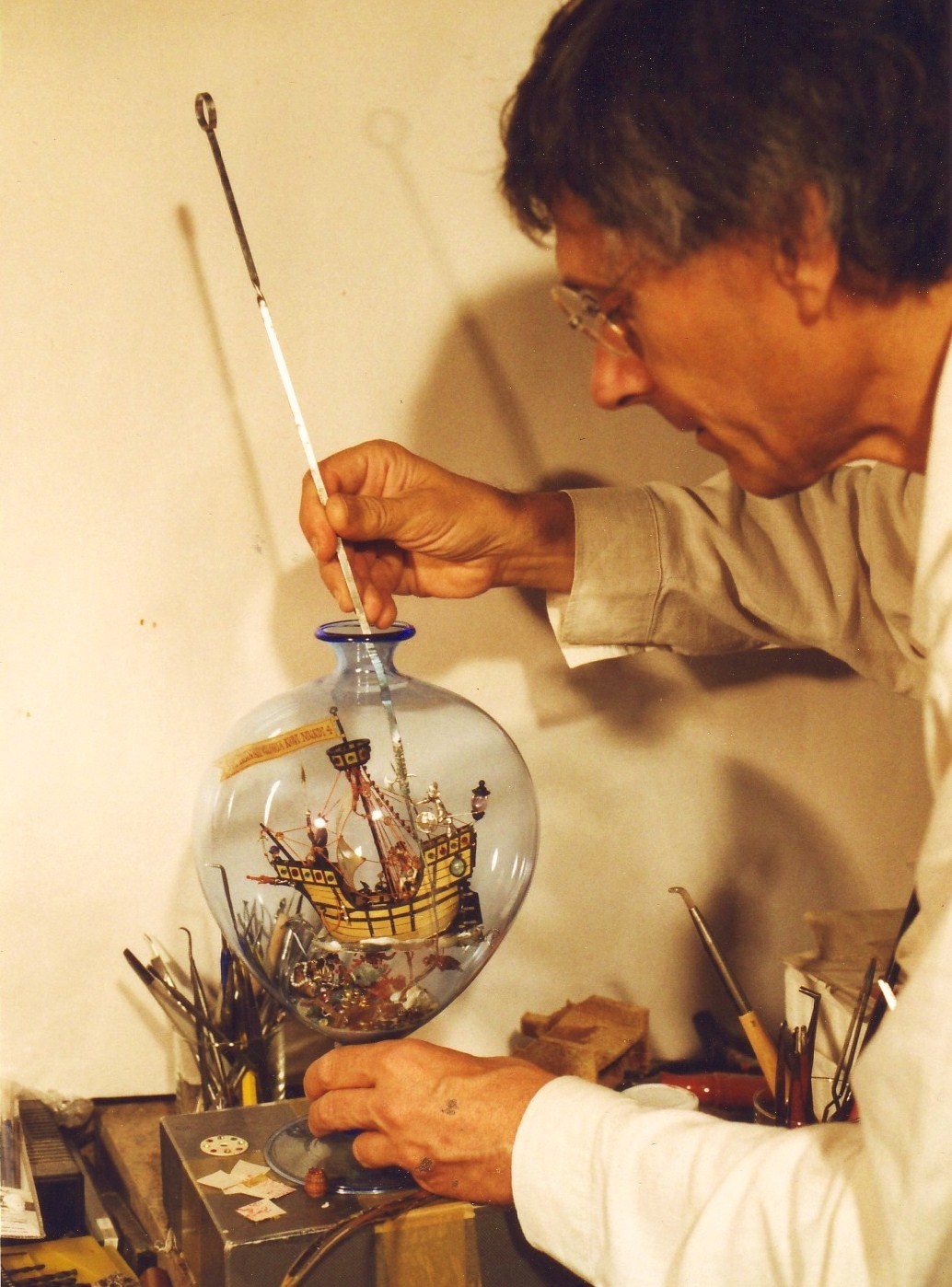 Assemblage de la Nef, orfèvrerie, allégorique des Conquérants. La scène est entièrement constituée de matériaux précieux qui symbolisent la soif des richesses des « Indes » qui pousse les Conquérants : or, argent, pierres précieuses, soie, perles, ébène, corail, etc. Vase "Véronèse" de Murano signé Alberto Matiello, dit « Geremia ». Modèle créé au début du XXe siècle par Vittorio Zecchin de la maison Cappellin Venini & C, d'après un vase peint en arrière-plan dans L’Annonciation de Paolo Véronèse, 1578, Musée de l'Académie de Venise.